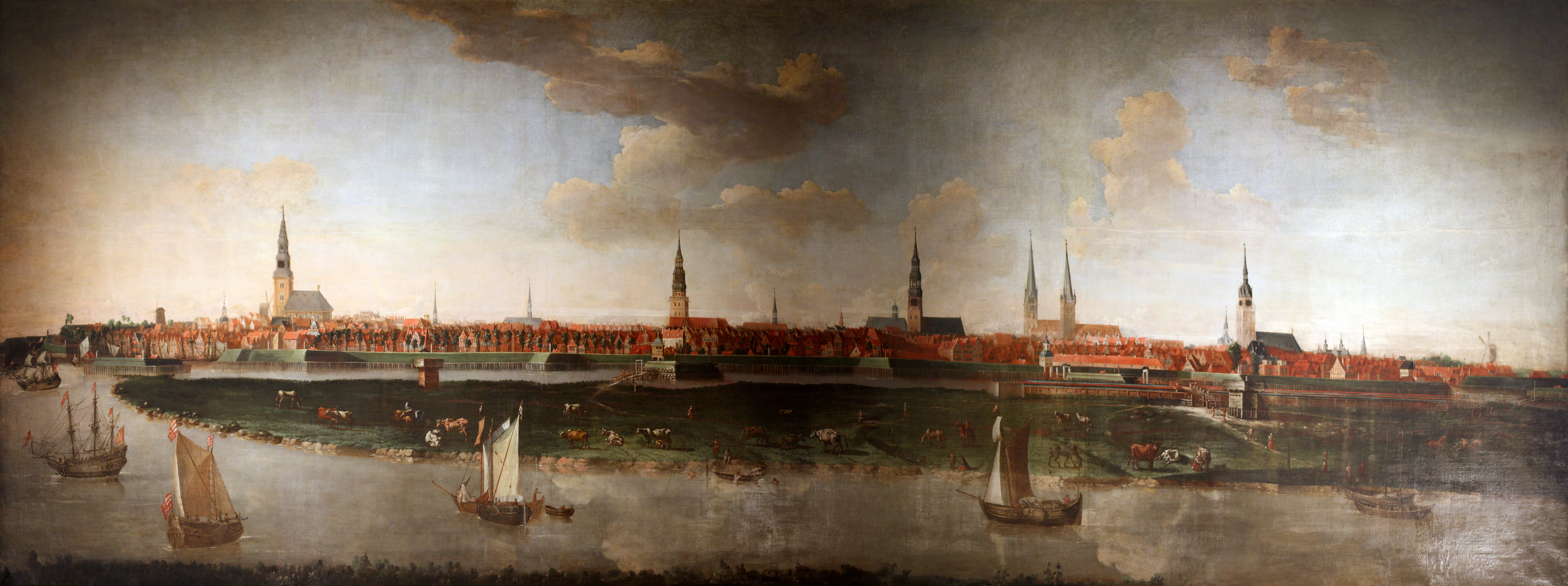 Stadtansicht Hamburg von 1681. Das Gemälde stammt vom Hamburger Historienmaler Joachim Luhn, das dieser auf dem Frachtschiff in der rechten Bildhälfte mit „AD 1681 J. Luhn pinxit“ signierte. Das Gemälde war ursprünglich für die Ratsstube vorgesehen und hängt heute in der Sankt Jacobikirche in Hamburg. Die wichtigsten Darstellungen auf dem Gemälde sind: Sankt Michaeliskirche, Kleiner Michel, Heilig-Geist-Kirche, Sandtor, Sankt Nikolaikirche, Maria-Magdalena-Kloster, Rathaus, Sankt Johannes-Kloster, Sankt Katarinen, Sankt Petri, Dom, Brooktor, Gertrudenkapelle, Sankt Jacobi. Am linken äußeren Rand ist zudem ein Konvoischiff abgebildet.